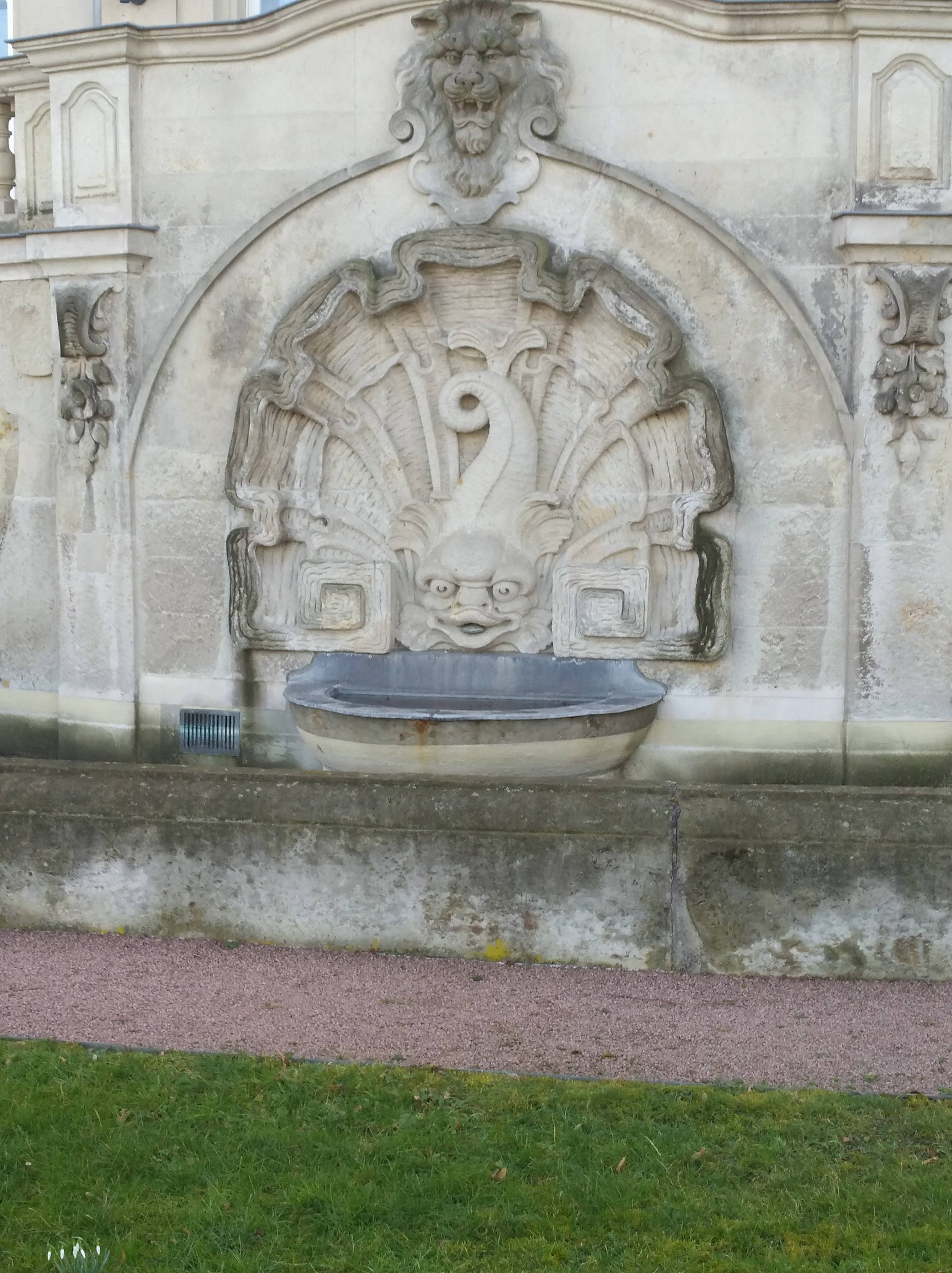 Delphinbrunnen an der Villa Käthe-Kollwitz-Ufer 88